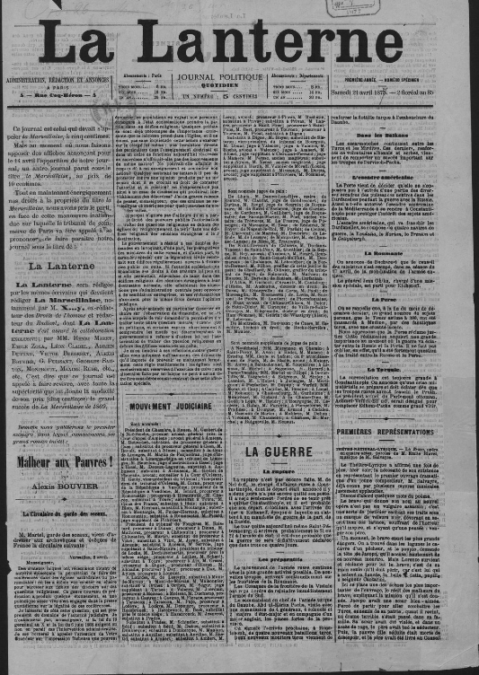 Page-titre de La Lanterne (1877)